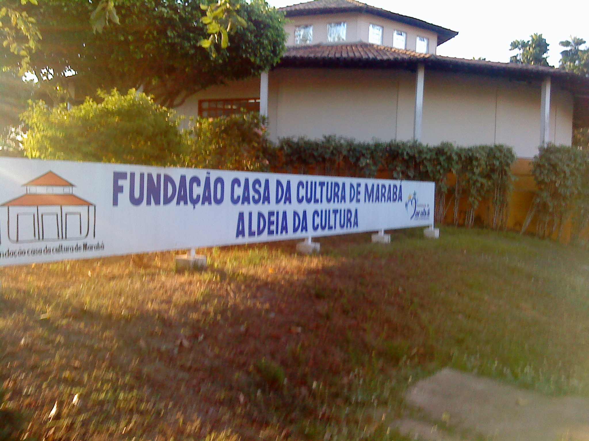 Fundação Casa da Cultura de Marabá.